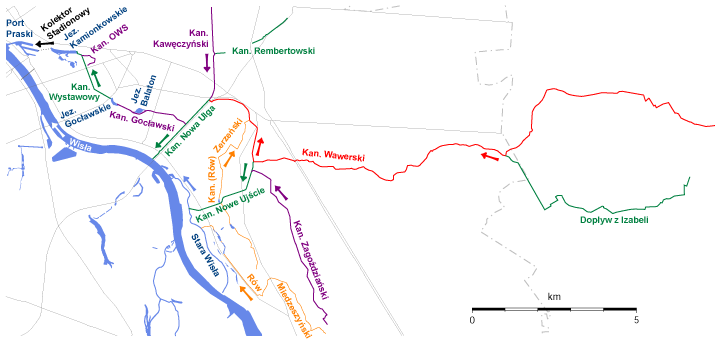 Kanały melioracyjne Niziny Wawerskiej - plan. Zasadnicza część wykonana przy pomocy programu GMT5